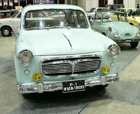 1955å¹´ ã‚¹ãƒ ãƒ«1500ï¼ˆP-1) 2006å¹´ æŠ•ç¨¿è€…æ’®å½±